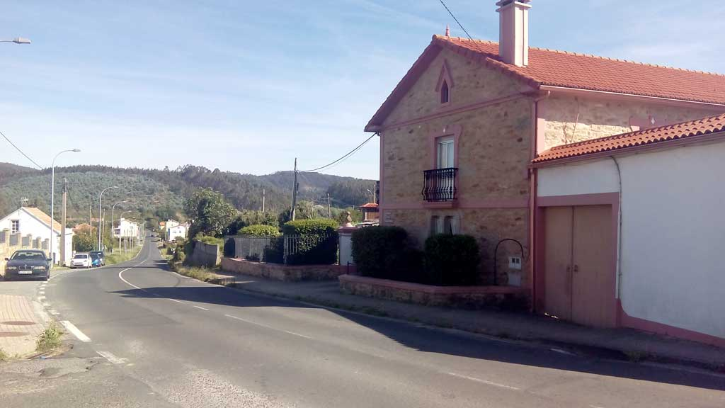 Vista de Raxón na DP3603 en Covas, Ferrol.